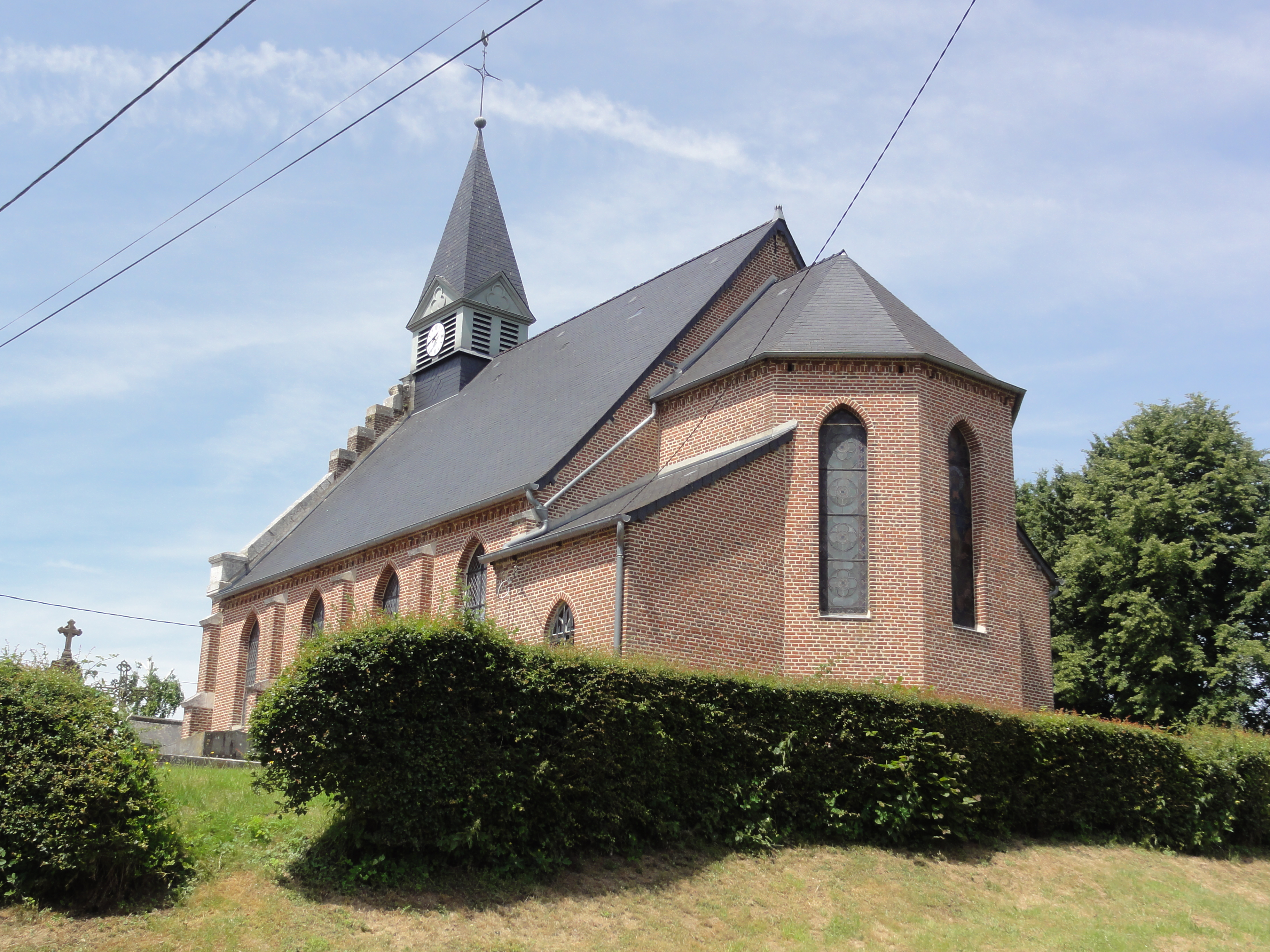 Dolignon (Aisne) église, chevet